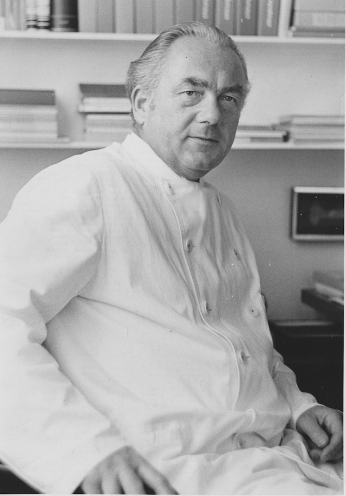 Chefarzt Engelbert Friedhoff